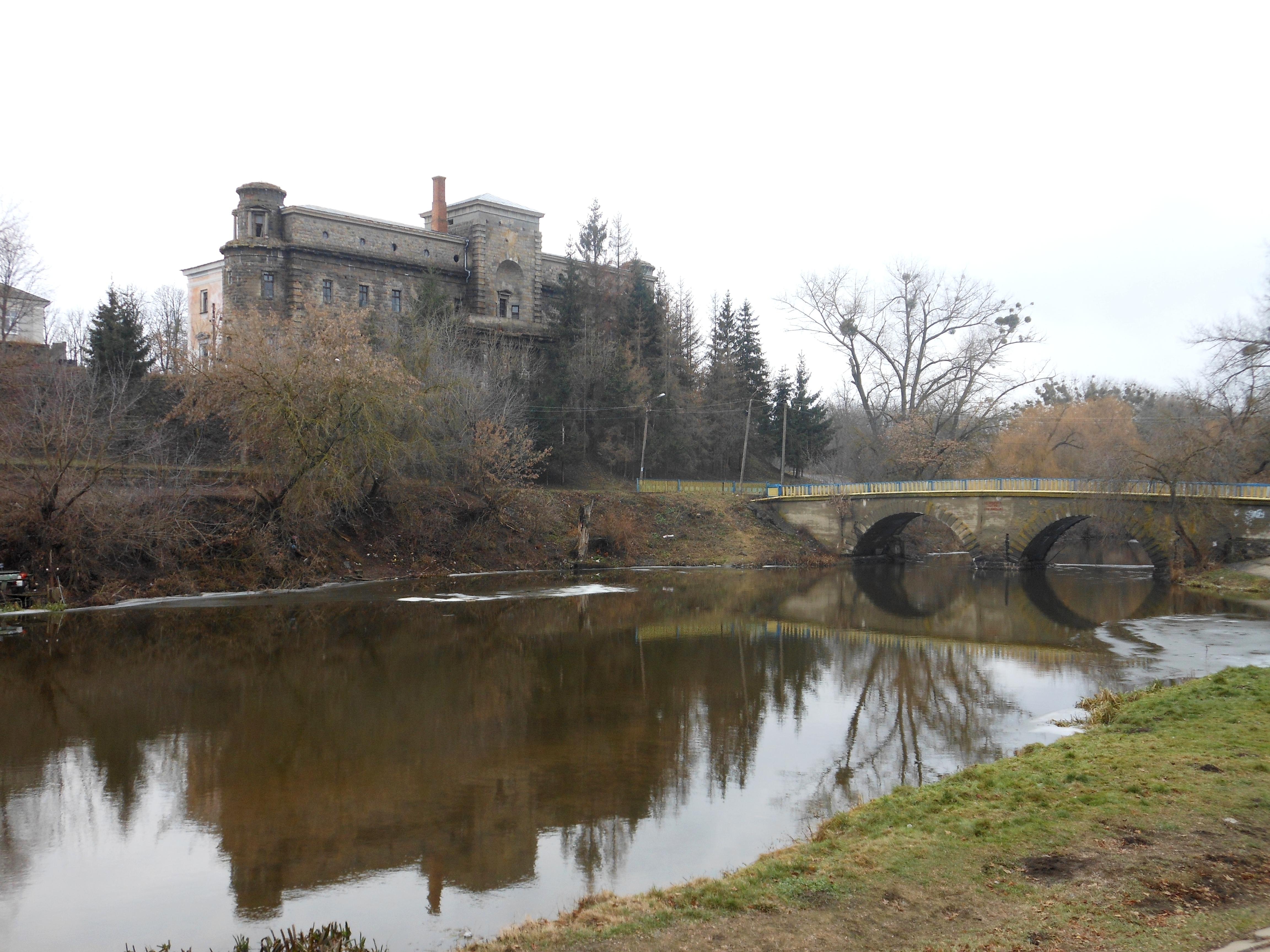 Міст, Хмільник, вул. Шевченка, 1